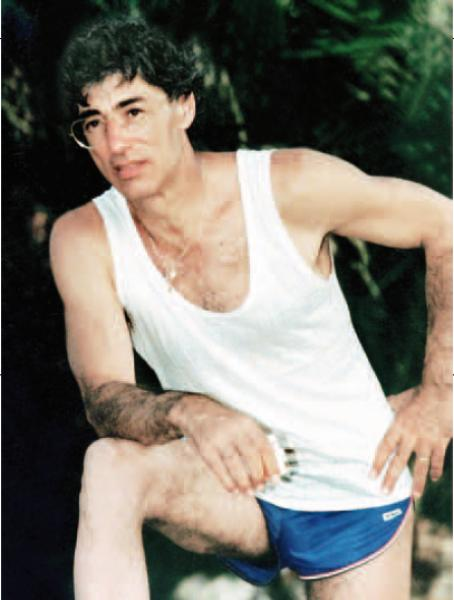 U. Bossi da giovane